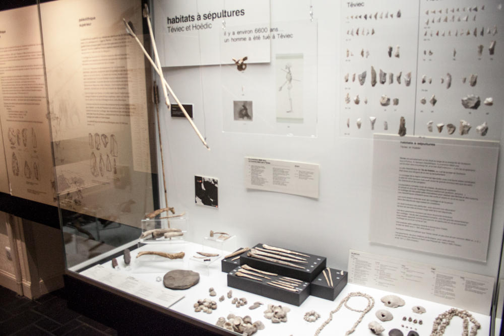 Musée_de_Préhistoire,_Carnac